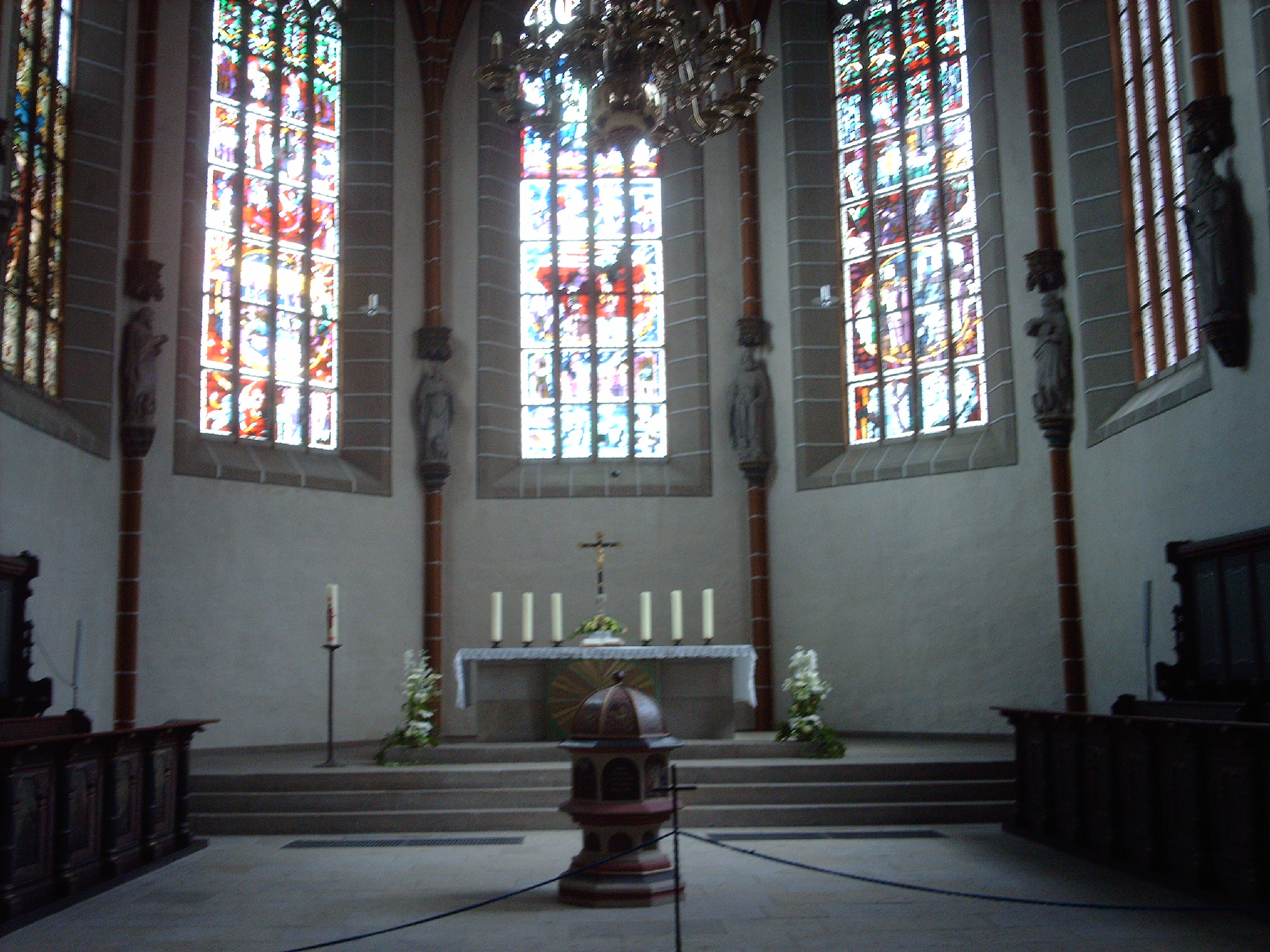 Chor mit Taufstein aus dem Jahre 1560 in der Georgskirche in Schmalkalden.